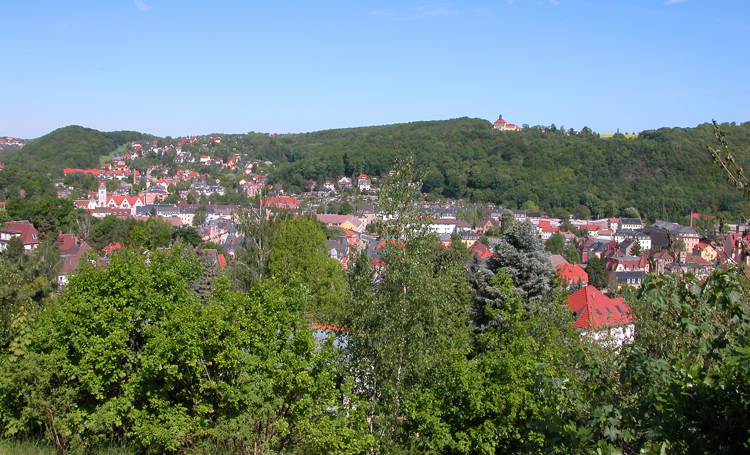 22.05.2006 01705 Freital: Blick vom Ferdinand-Freiligrath-Weg über Freital-Birkigt und Potschappel zum (v.l.n.r.) Burgwartsberg, Freital-Niederpesterwitz und dem Jochhöhschlößchen (Weinberghaus 1796). In der DDR Altersheim. 2003 Umbau zu Eigentumswohnungen. [DSCN10106.TIF]20060522065.JPG(c)Blobelt